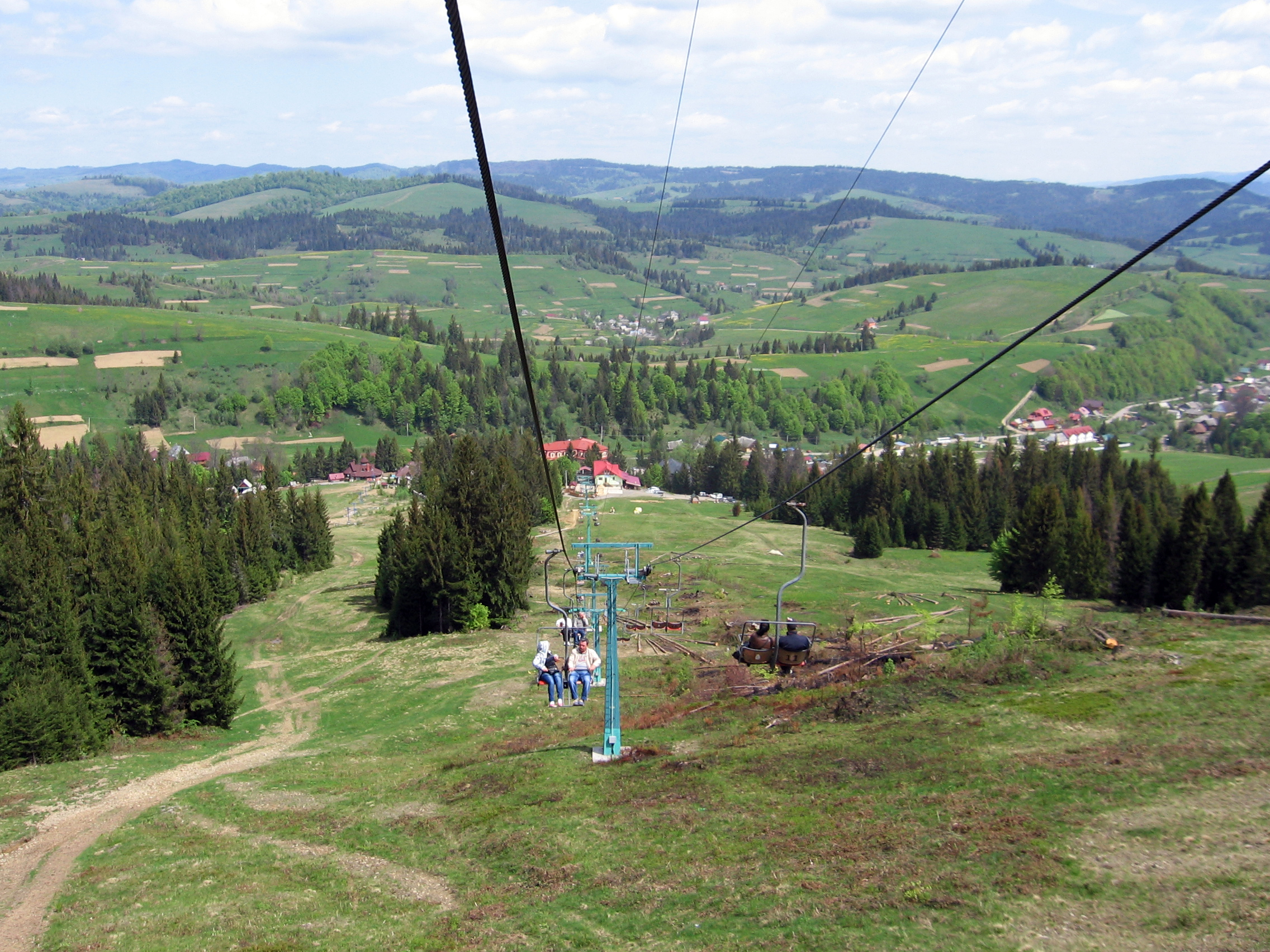 Крісельний витяг на гору Гемба (с. Пилипець) навесні